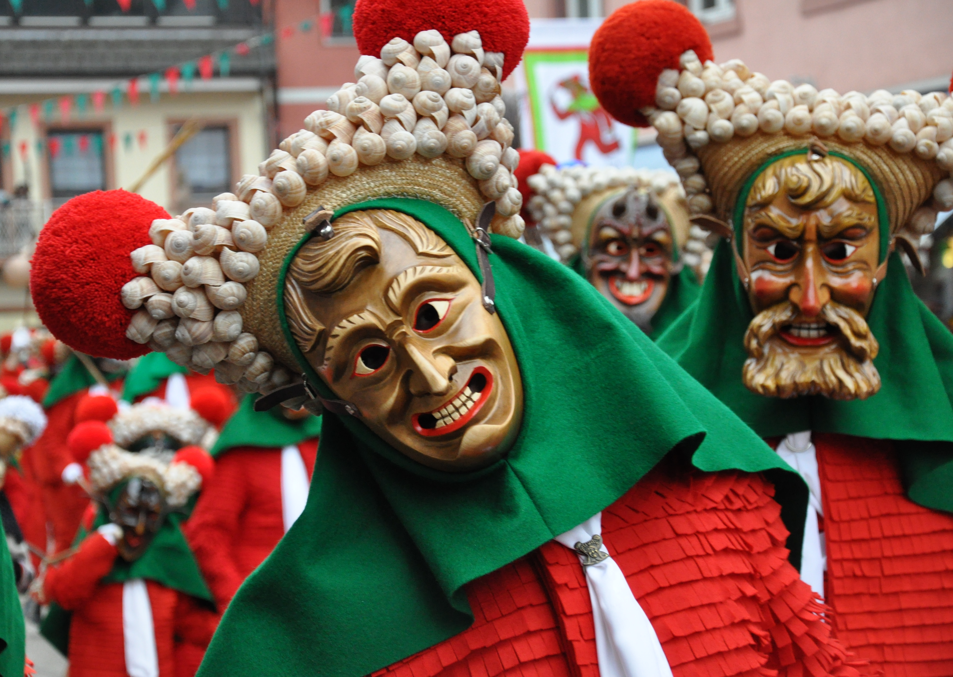 Elzach, Narren der Narrenzunft Elzach beim Narrenlaufen am Fasnetssonntag-Nachmittag 2014; Narrenfigur: Schuttig